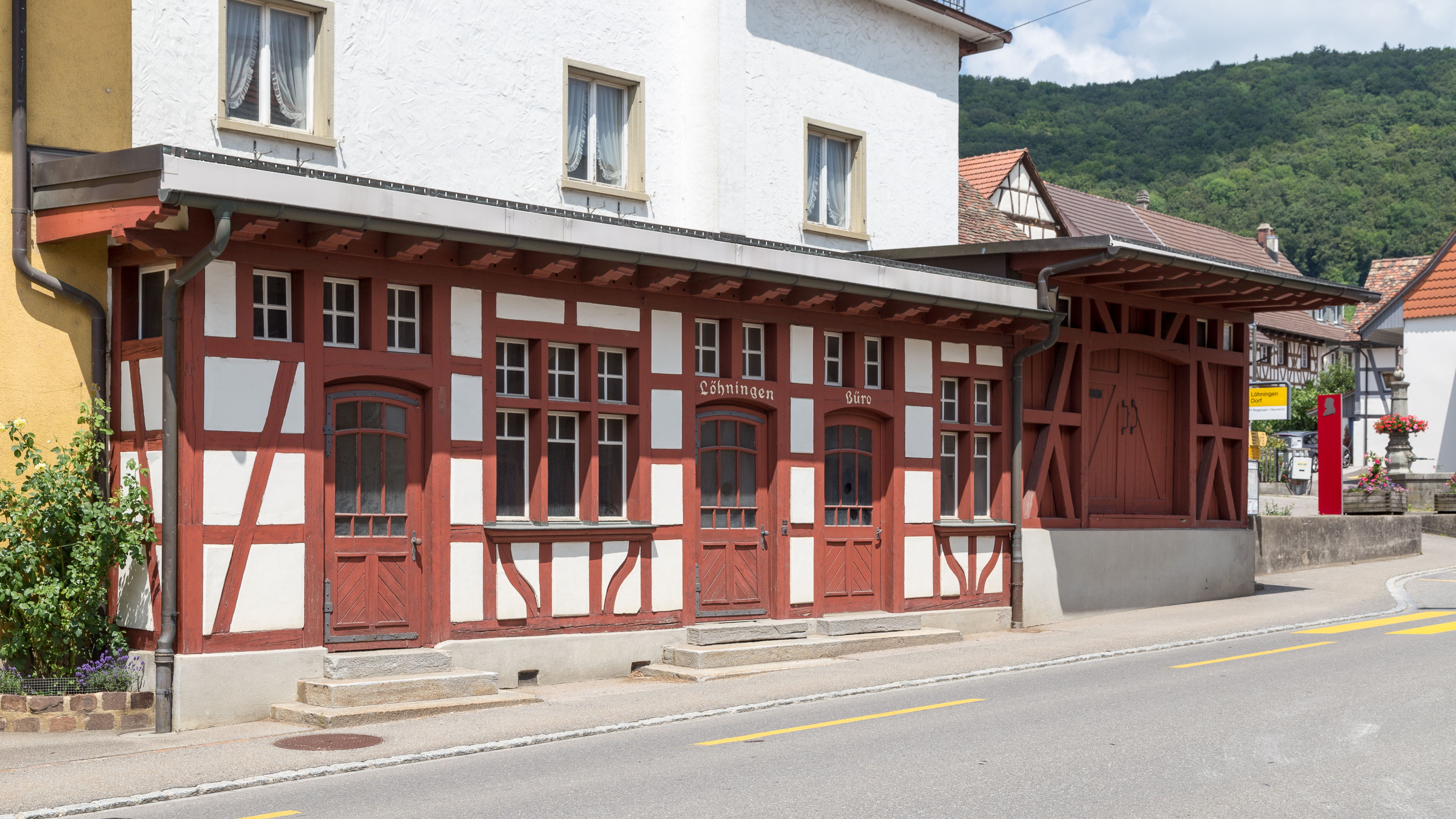 Bahnhof, Stationsgebäude der ehemaligen Tramlinie